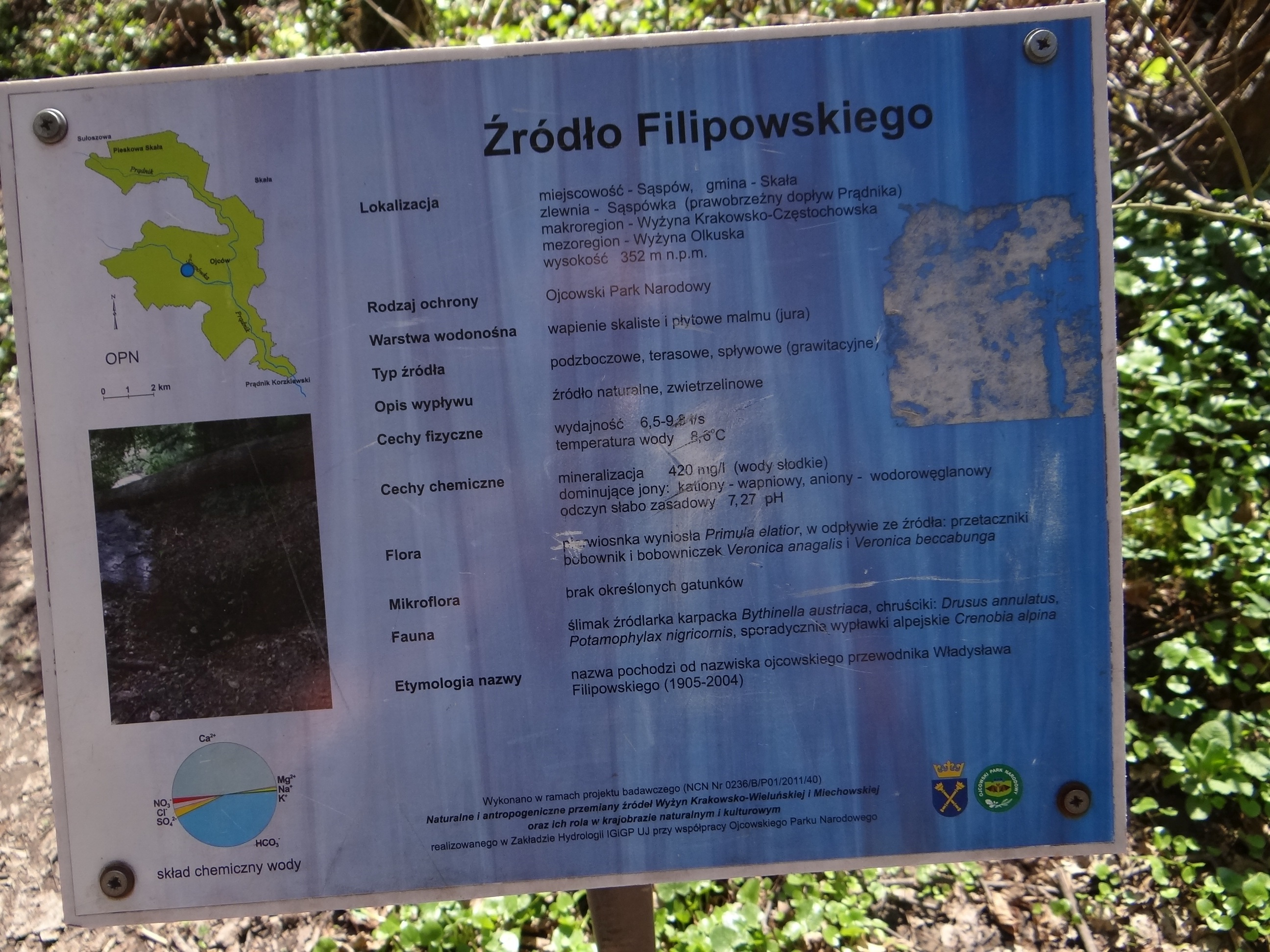 Tabliczka przy Źródle Filipowskiego